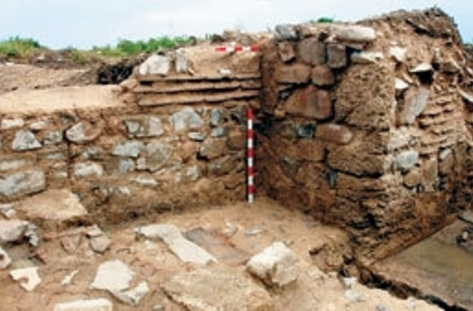 Късноантична крепост при полуостров " Хрисосотира " е разположена в югозападната част на полуостров " Свети Никола " , построена е през V в.